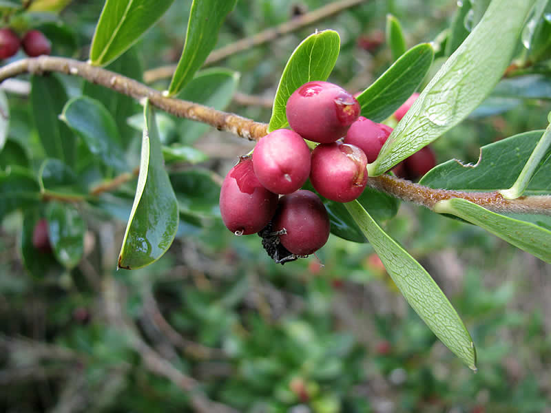 Pillo Pillo (Ovidia pillo-pillo) fruits